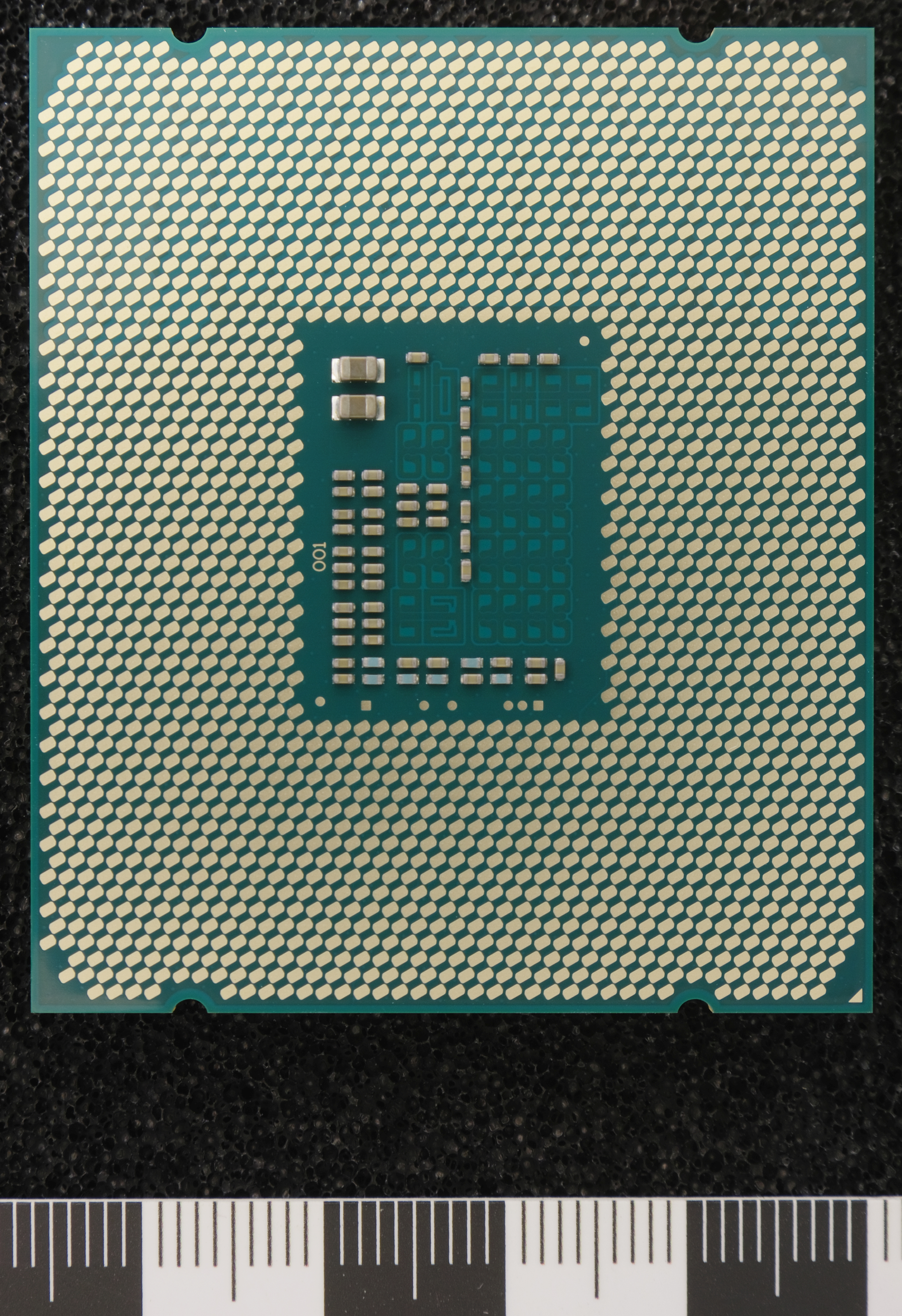 Intel Core i7 - 5820K Prozessor, Sockel 2011-3, Unterseite mit Zentimetermaß